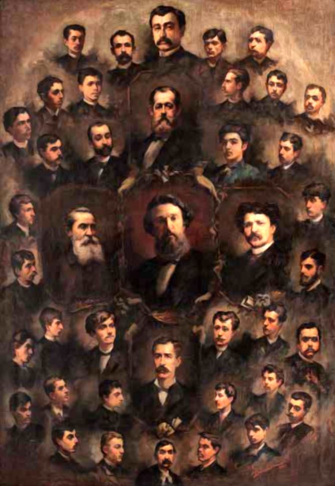 Luchian și Generația 1888, ulei pe panză / oil on canvas, 128 x 94 cm, semnat și datat dreapta jos, cu roșu, ABănulescu, (18)88 - Muzeul Universității Naționale de Arte București. În centru, profesorul și directorul școlii, Theodor Aman, flancat de profesorul de pictură Gheorghe Tattarescu (stânga) și de cel de estetică, C.I. Stăncescu (dreapta). Crucea tablou-lui este completată pe verticală de profesorul de anatonie, N. Polizu (jos), și cei de sculptură, Karl Storck și Ion Georgescu (sus). Ștefan Luchian, student la Belle Arte până în 1889, este portretizat pe rândul al treilea de sus, primul din stânga.